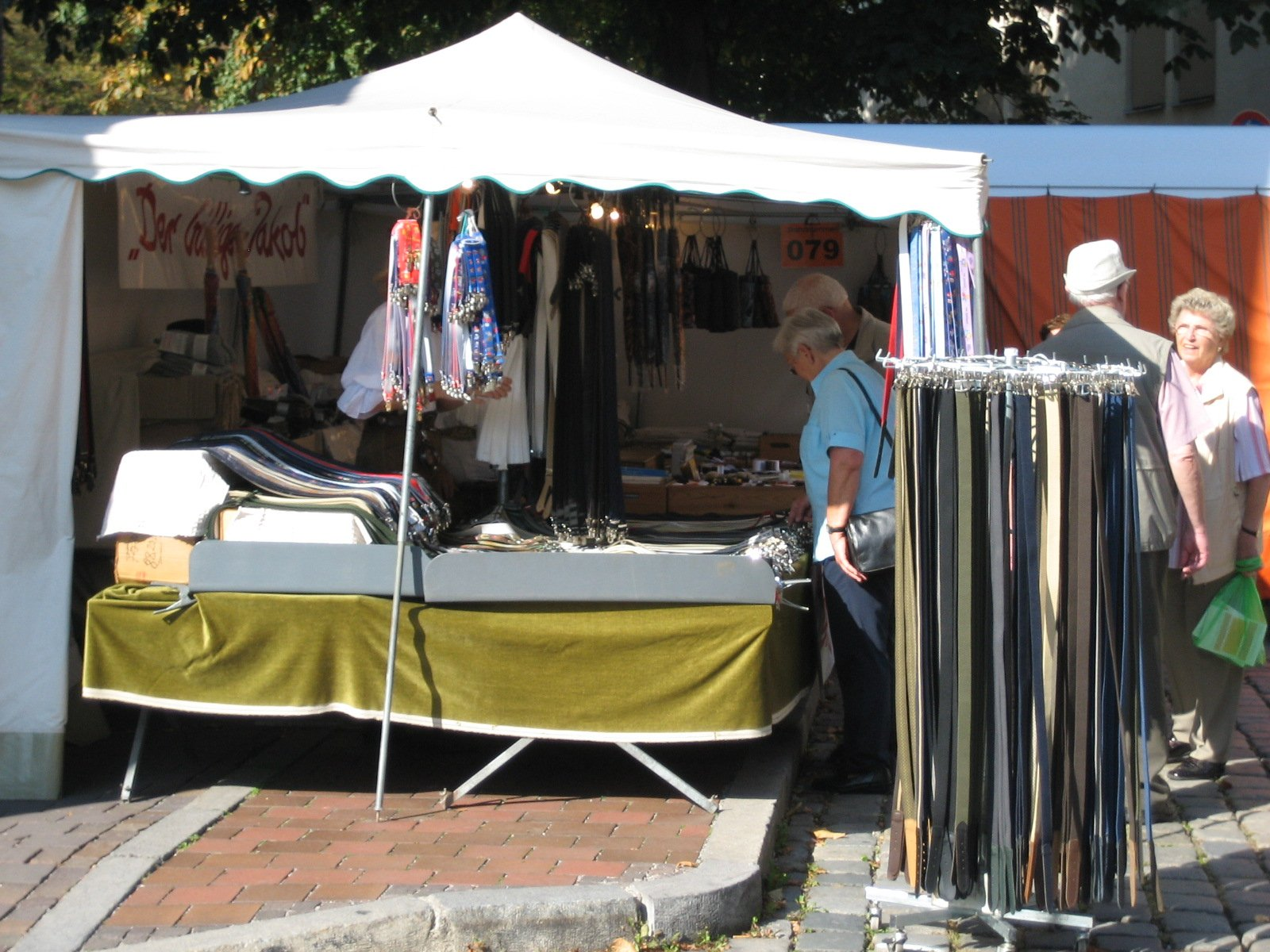 Herbstdult 2009 in Augsburg, Stand des "Billigen Jakobs" am Vogeltor